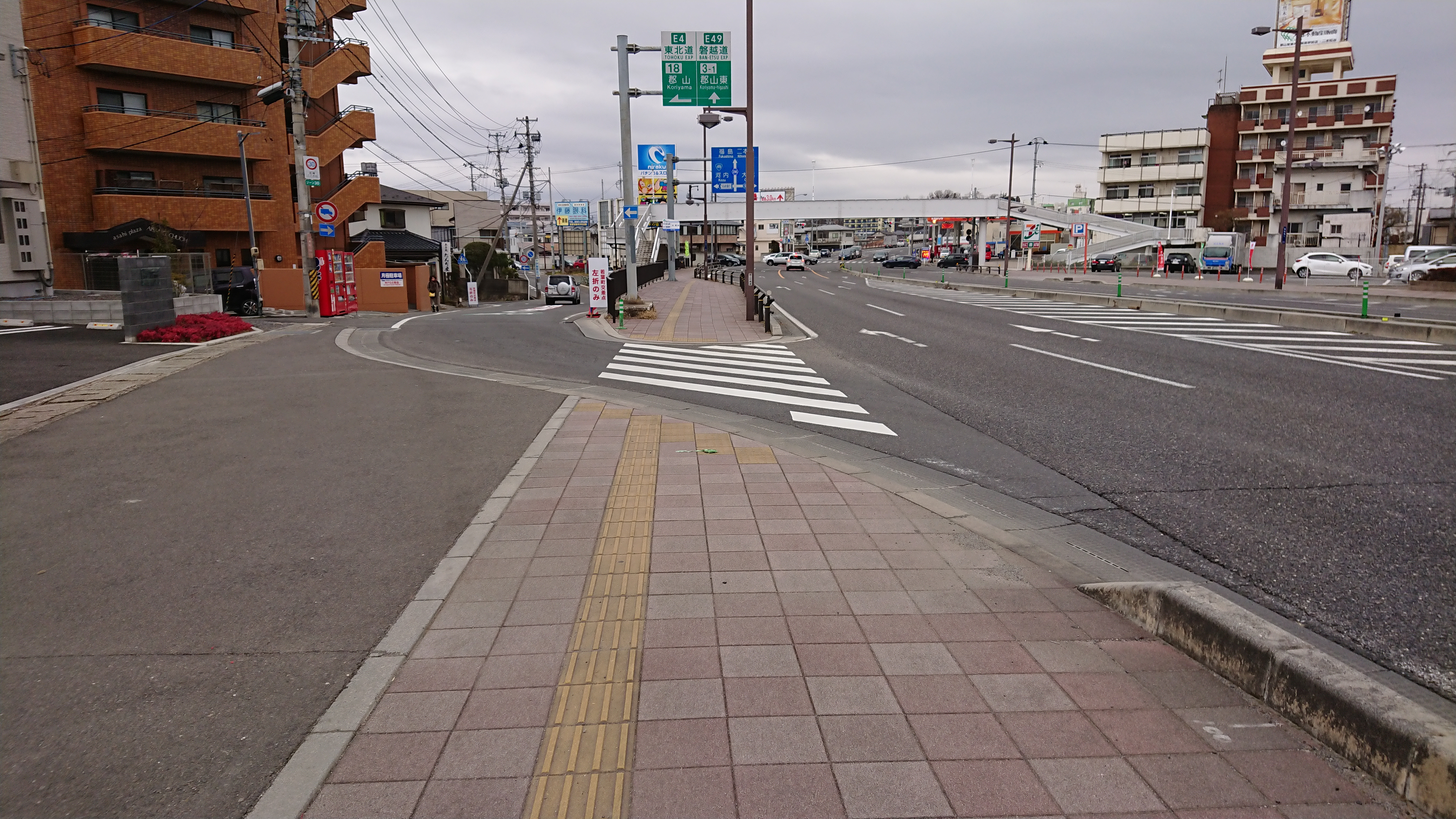 赤木町地内の県道296号屈折点